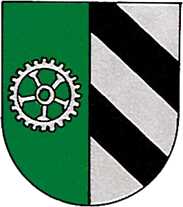 Wappen Zeltweg, stemma zeltweg, coat of zeltweg